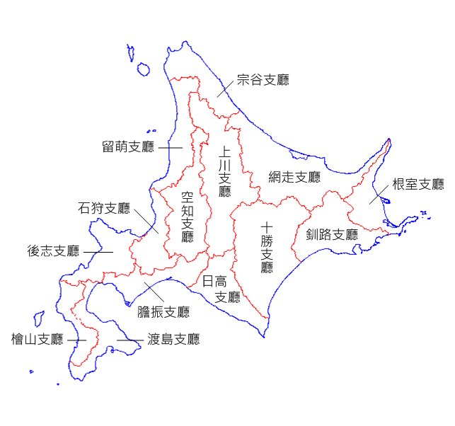 日本北海道支廳位置圖